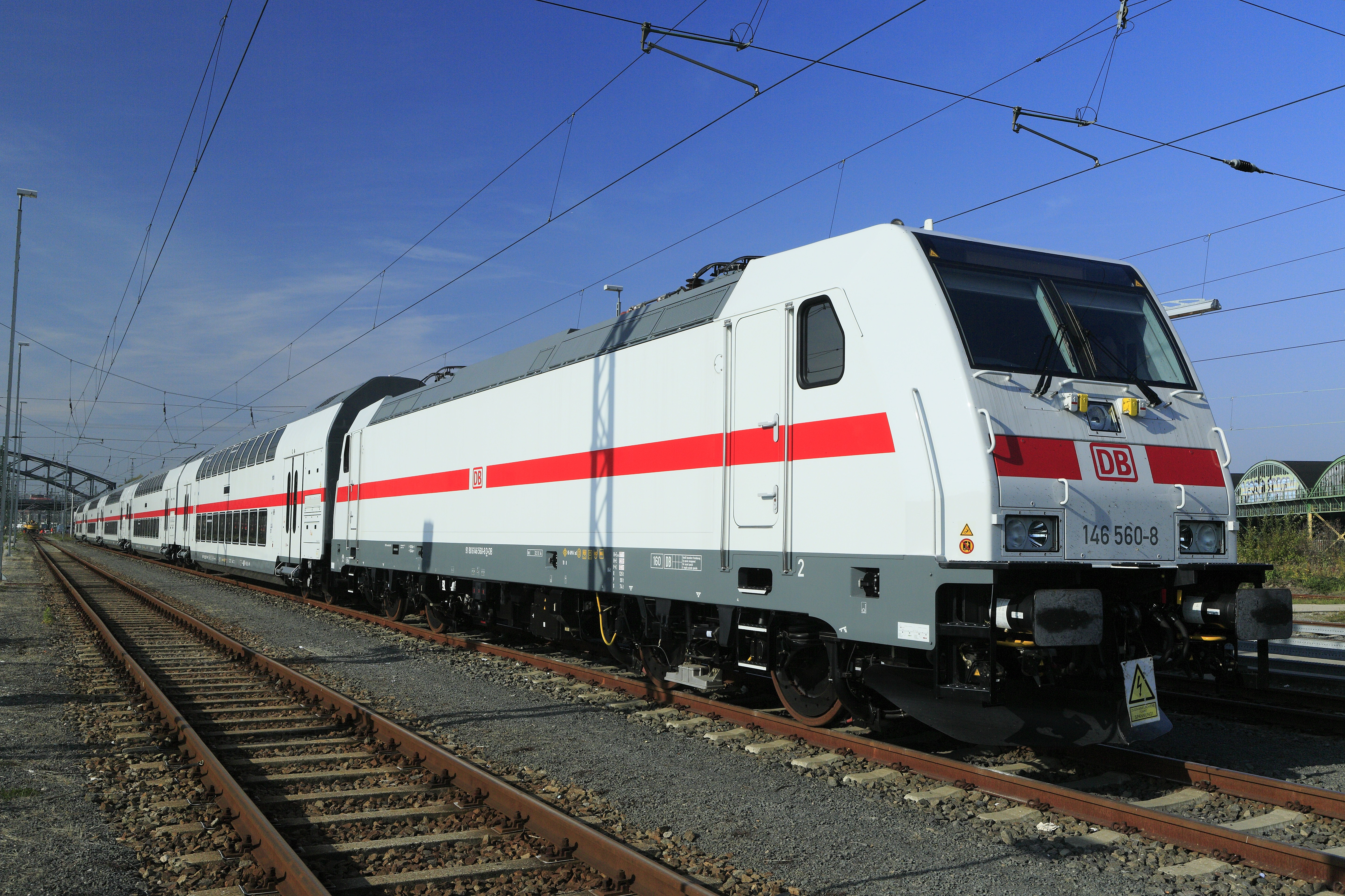 … im glänzenden Neulack mit Fernbahndoppelstockeinheit IC2, abgestellt für Personalschulungen. Die Zugsammelschiene steht trotz abgerüsteter Maschine durch Fremdeinspeisung am Steuerwagen unter Spannung, deshalb das Warnschild am Zughaken. Nur diese Lokomotiven der Reihe 146.5 sind nicht mit dem ansonsten bei der DB üblichen verkehrsroten Einheitslack versehen worden.